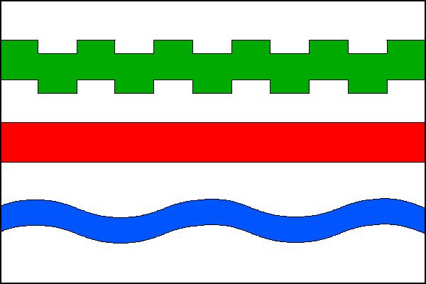 Vlajka obce Bílence